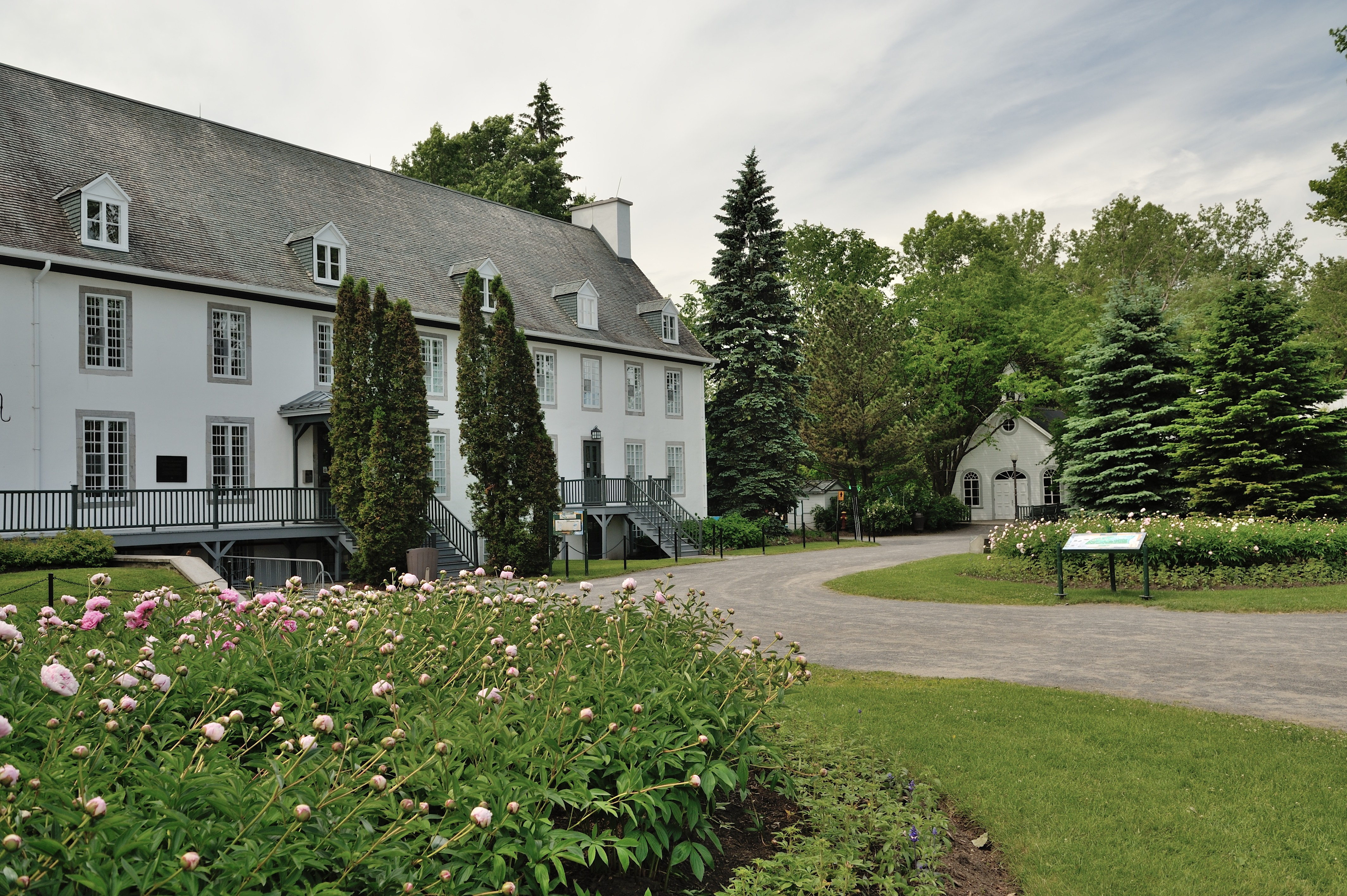 Immeubles historiques du domaine de Maizerets. Endroit exceptionnel à découvrir. Accessible au 2000 boulevard Montmorency à Québec. Wikipédia prend Québec.